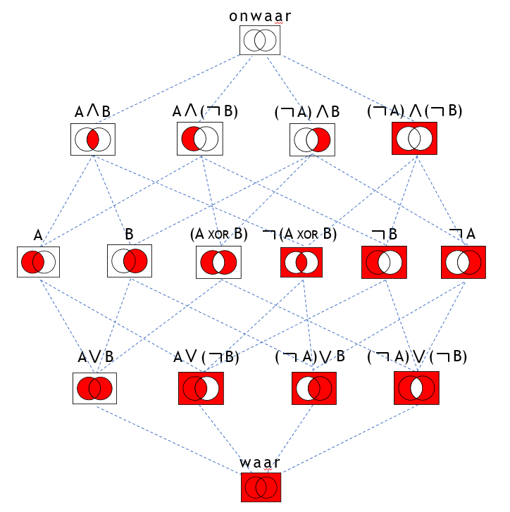 Booleaanse functies van twee variabelen - Ned - versie04